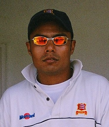 Danish Kaneria